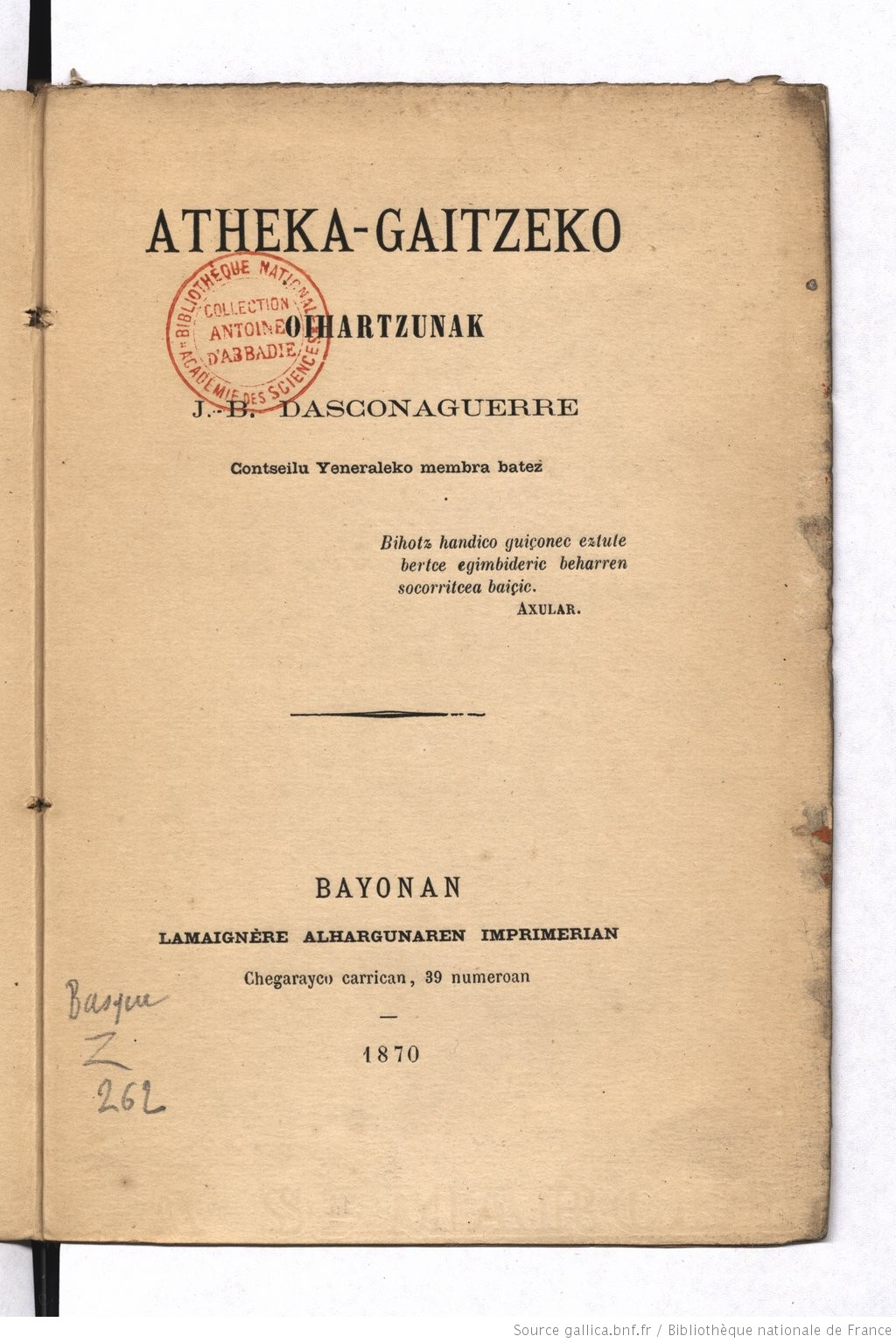 JB Dazkonagerreren "Atheka-gaitzeko oihartzunak" liburuaren lehen argitalpenaren azala (Baiona, 1870)